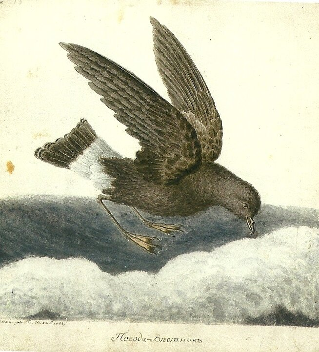 Михайлов Павел Николаевич - Погодовестник